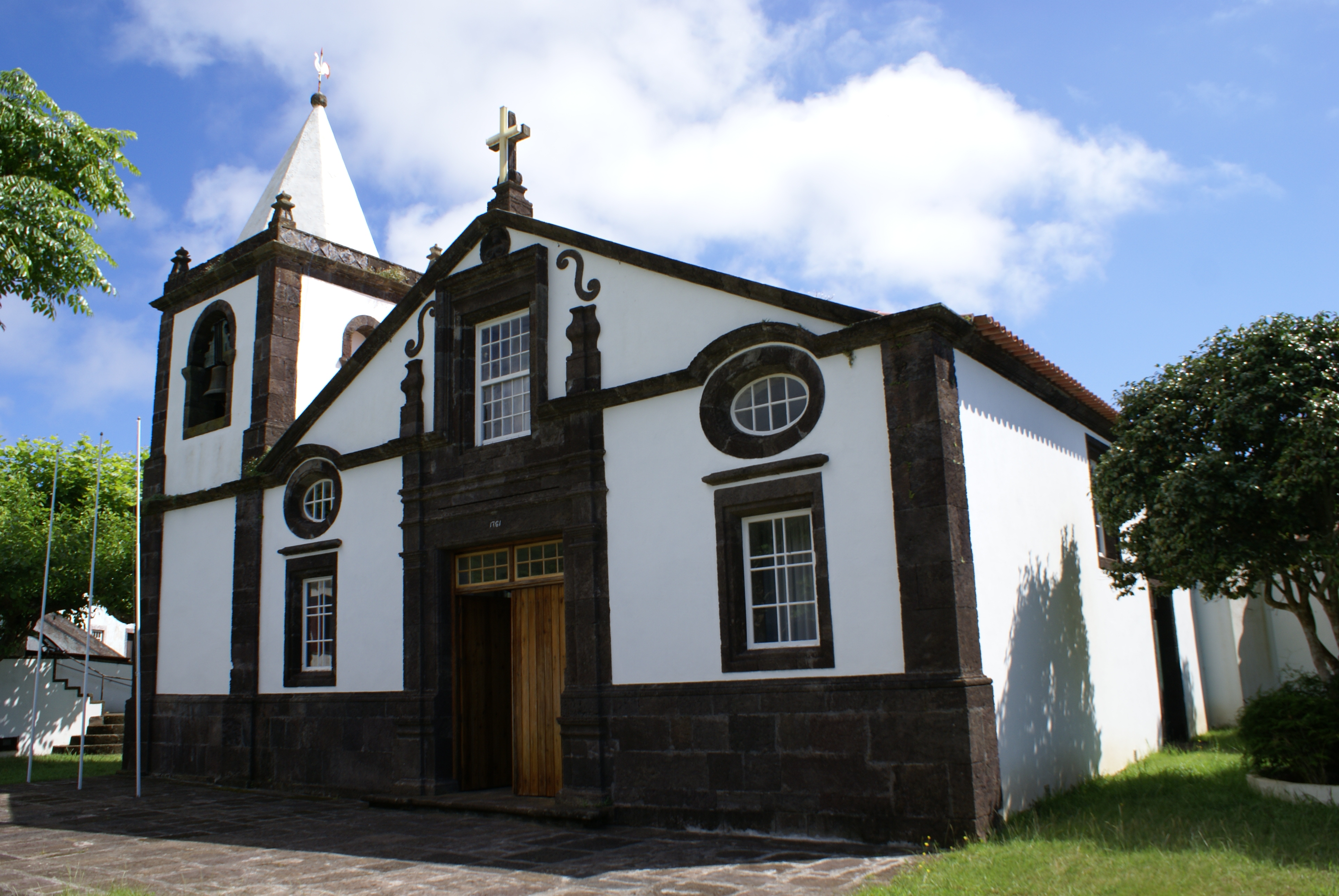 Igreja de Nossa Senhora do Rosário, fachada, Topo, Calheta, Açores